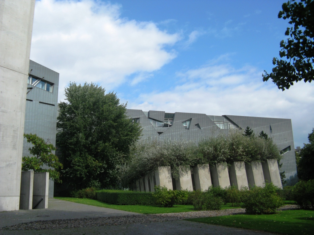 Jüdisches Museum Berlin mit Garten des Exils, Außenansicht